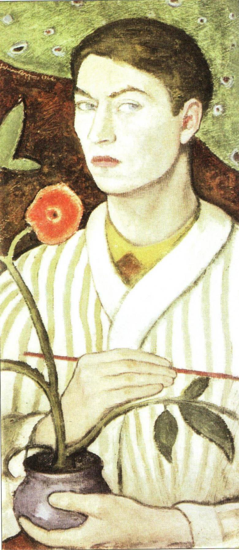 Sabin Popp, Autoportret